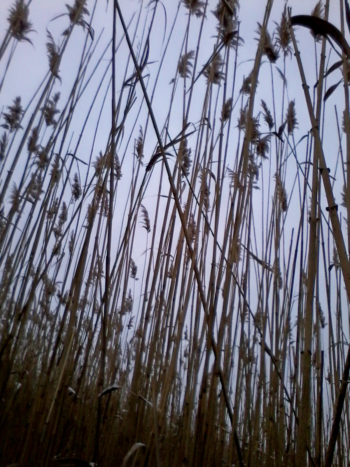 Знято телефоном Samsung на початку січня 2016 року на березі Південного Бугу, Миколаїв, Матвіївка.